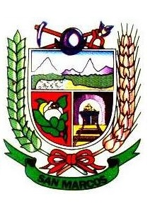 Escudo del Distrito de San Marcos